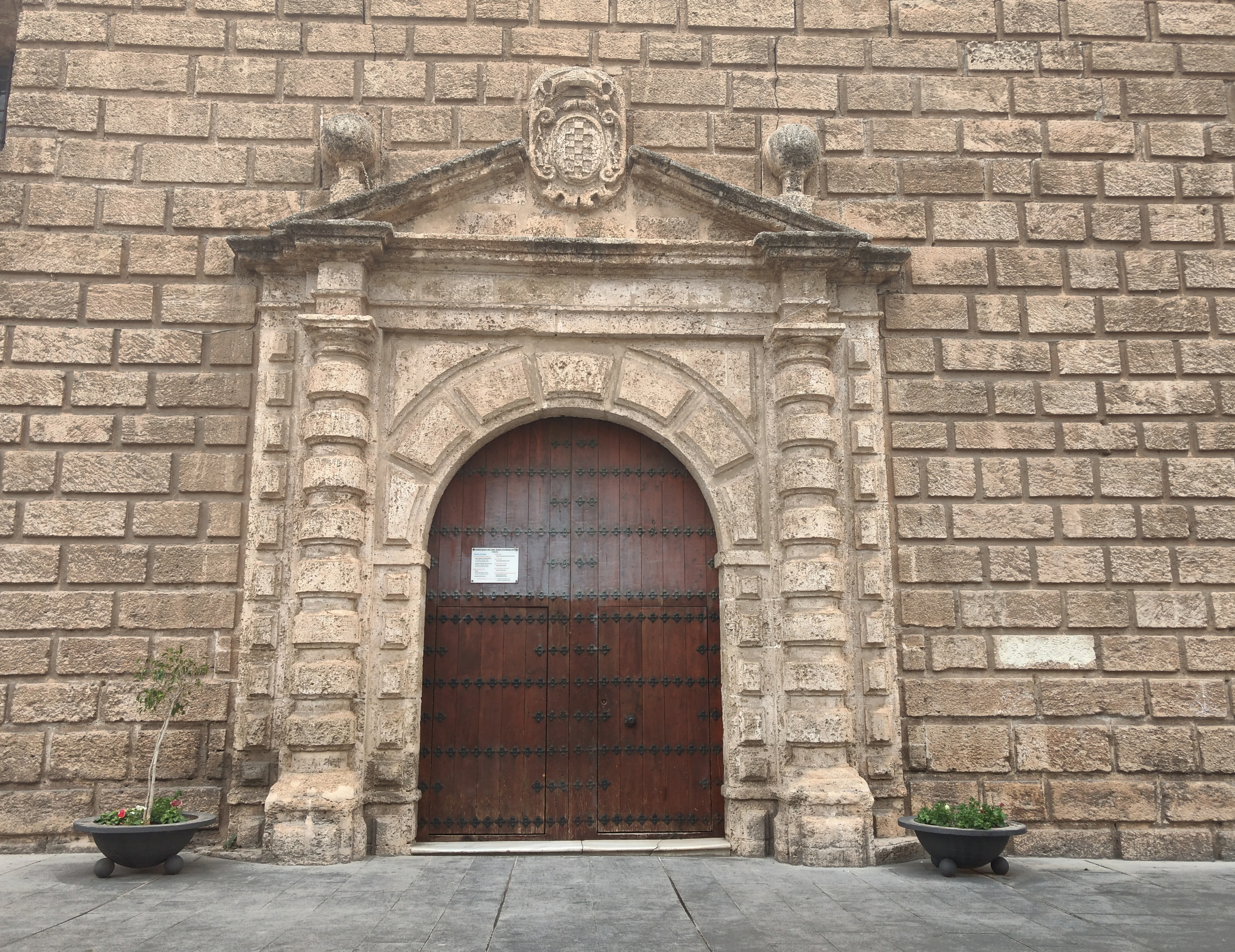 iglesia de San Juan Evangelista